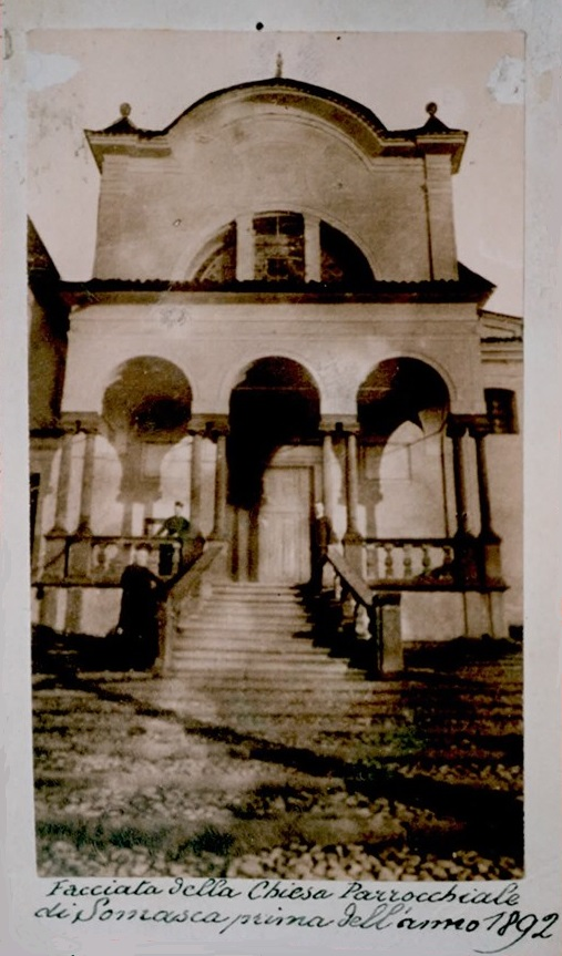 Basilica di San Bartolomeo e San Girolamo Emiliani a Somasca, frazione di Vercurago, prima dei lavori di ampliamento del 1892